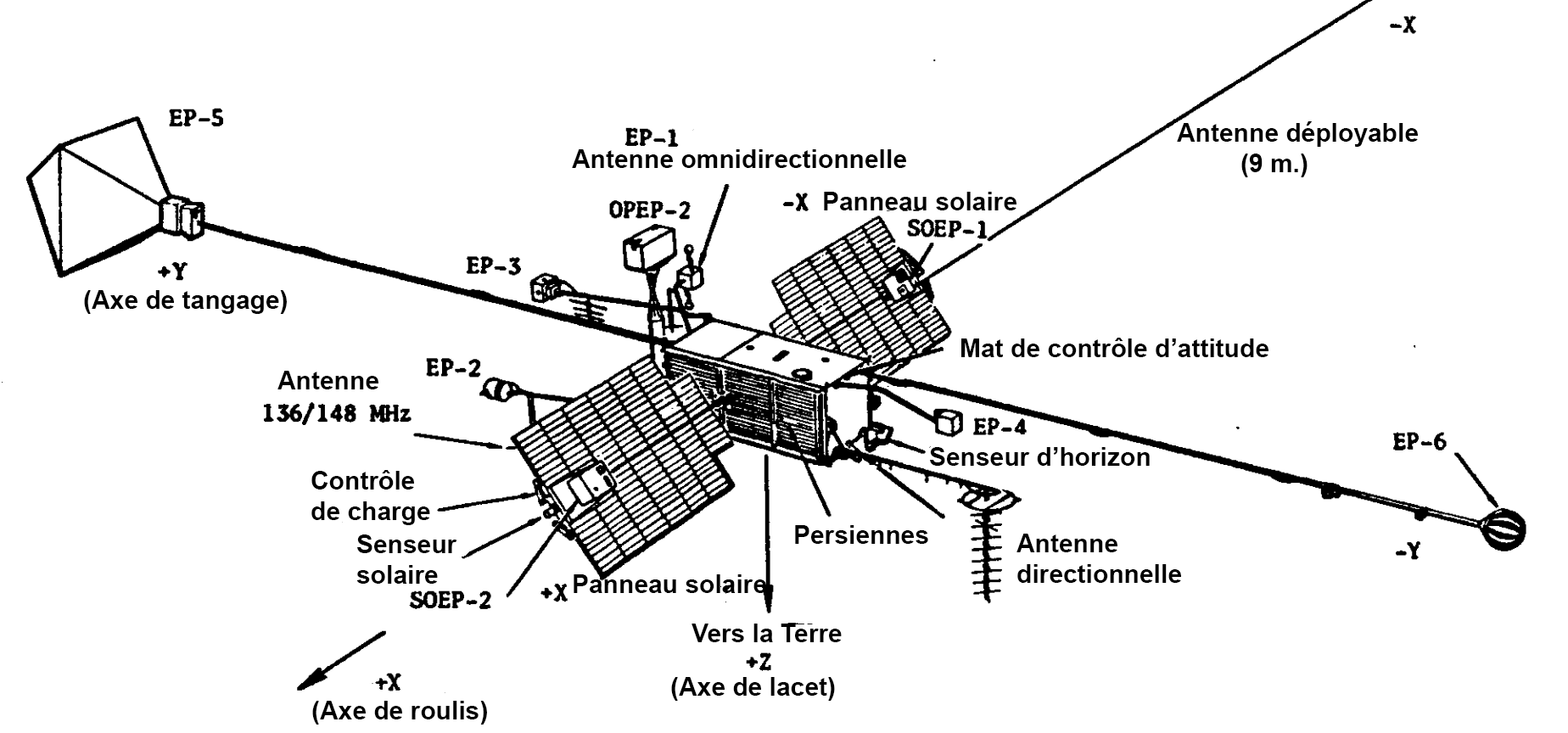 Schéma des satellites Orbiting-Geophysical-Observatory (libellés en francais)